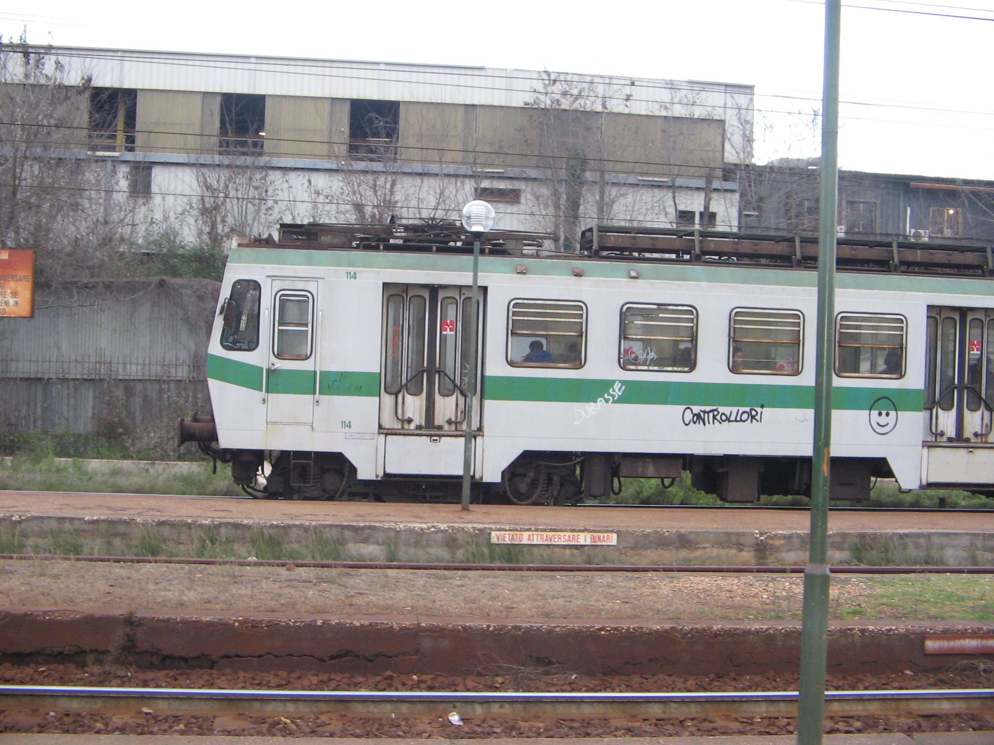 Metropolitana di Roma. Linea Roma - Viterbo Stazione Tor di Quinto: un treno